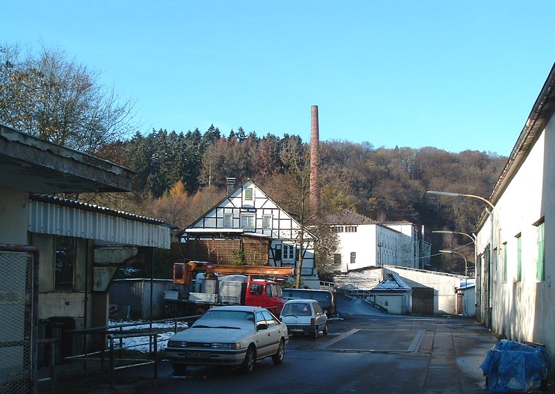 Die alte Papierfabrik in Wilhelmstal Fotografiert von Benutzer:Taube Nuss im November 2004 "Lizenz:GNU FDL"